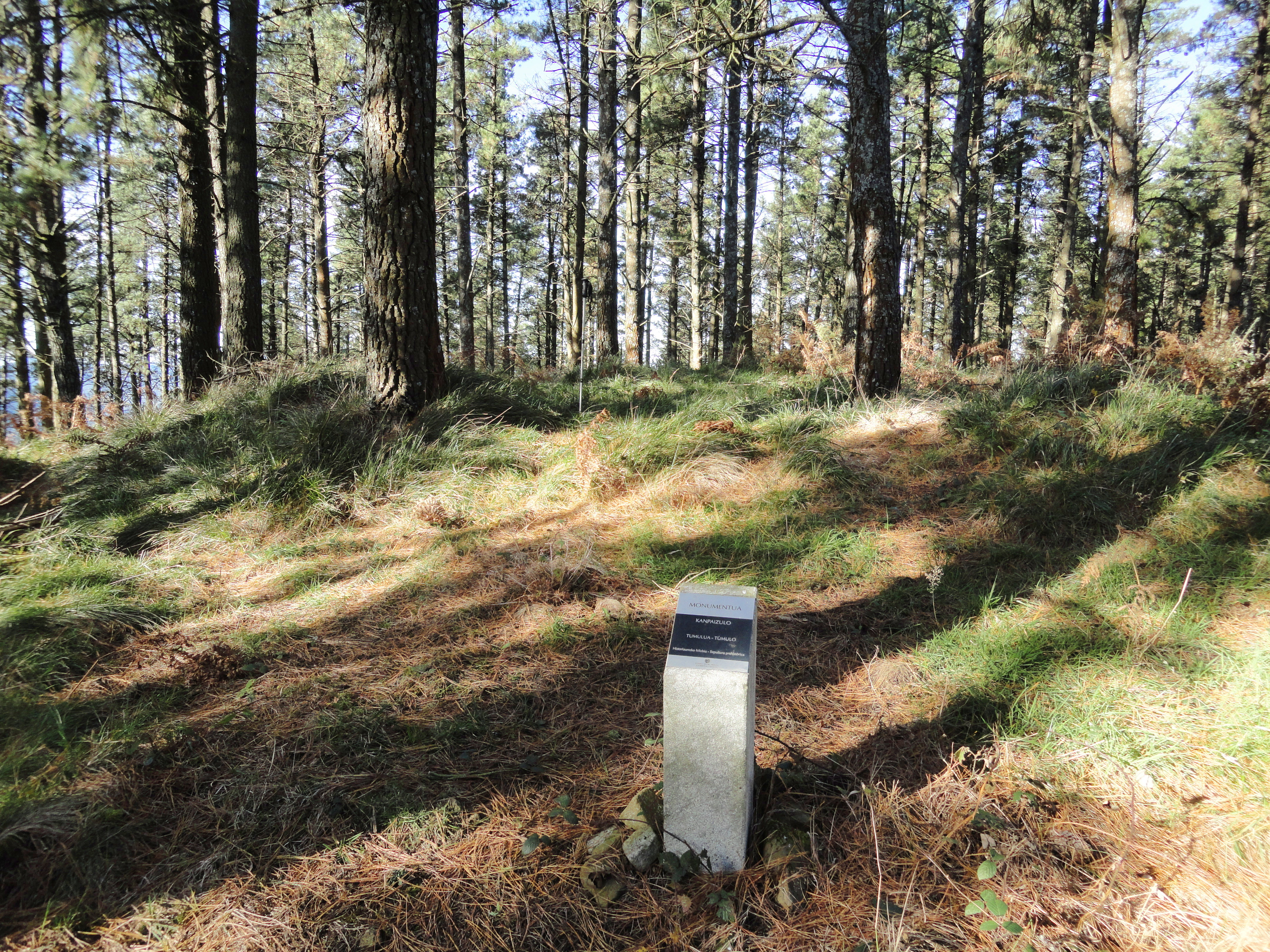 Kanpaizulo tumulua